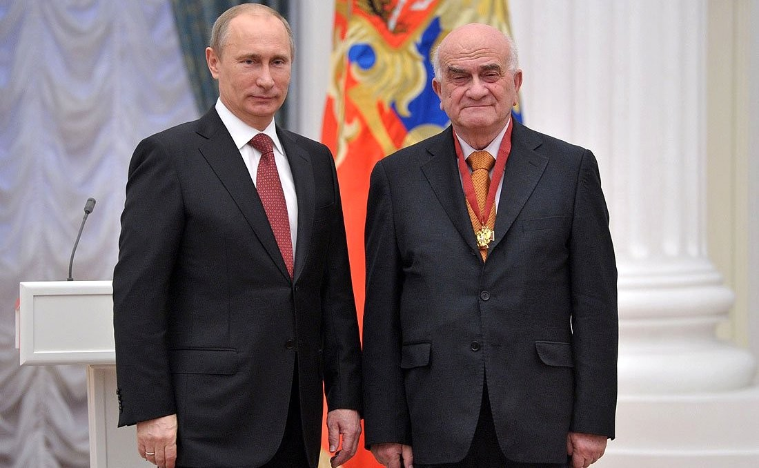 Церемония вручения государственных наград РФ. Орденом «За заслуги перед Отечеством» III степени награждён научный руководитель НИУ «Высшая школа экономики» Евгений Ясин